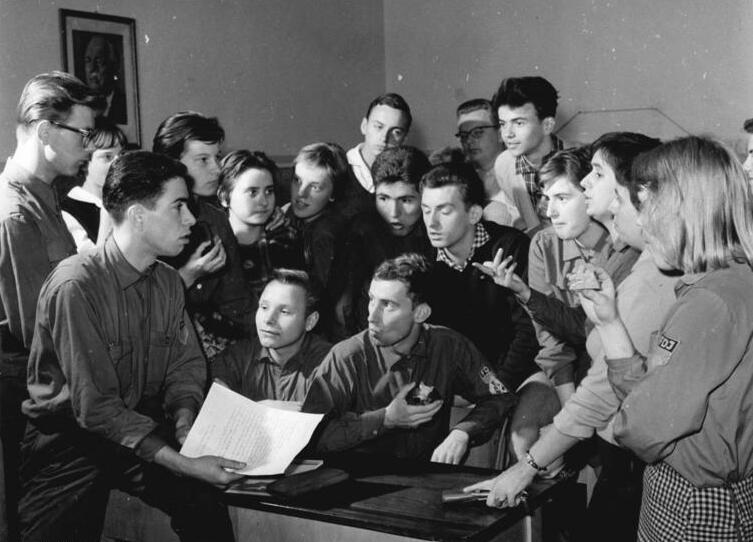 ADN-ZB-Koch-26.9.1961-Lernaufgebot der FDJ. Die FDJ-Gruppe der Klasse 12b 3 der erweiterten Richard-Wagner-Oberschule in Leipzig wandte sich mit einem Aufruf an alle Schüler und FDJ-Mitglieder der erweiterten Oberschulen. In diesem Aufruf heißt es: "Schüler und FDJ´ler der erweiterten Oberschule! Laßt uns den Arbeitern in den Produktionsbetrieben nacheifern. Kämpfen wir gemeinsam im Lernaufgebot der FDJ um bessere Unterrichtsergebnisse. Die Jungendfreunde derr 12b 3 wollen nicht nur ihre schulischen Leistungen verbessern. Die Jungen der Klasse erklären gleichzeitig ihre Bereitschaft zum Ehrendienst in der NVA und die FDJ-Gruppe will geschlossen den Kampf gegen das Westfernsehen und das Hören von NATO-Rundfunksendern aufnehmen. UBz: Die Jungendfreunde der 12b 3 mit ihrem FDJ-Sekretär Günther Steingroewer bei der Diskussion über ihren Aufruf."